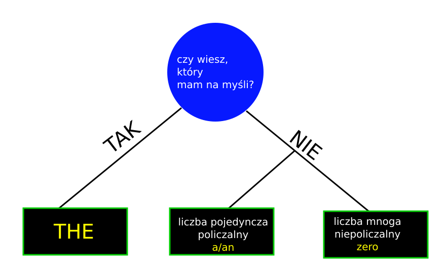 Algorytm używania przedimków